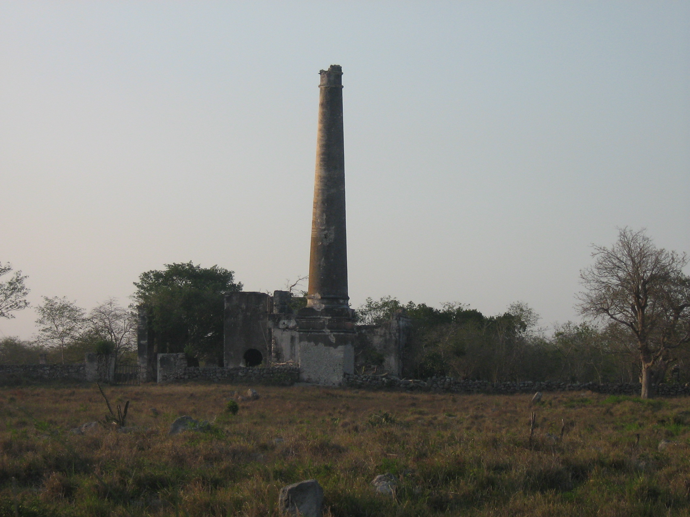 Hacienda abandonada en la carretera Mérida-Tizimin, Yucatán, México